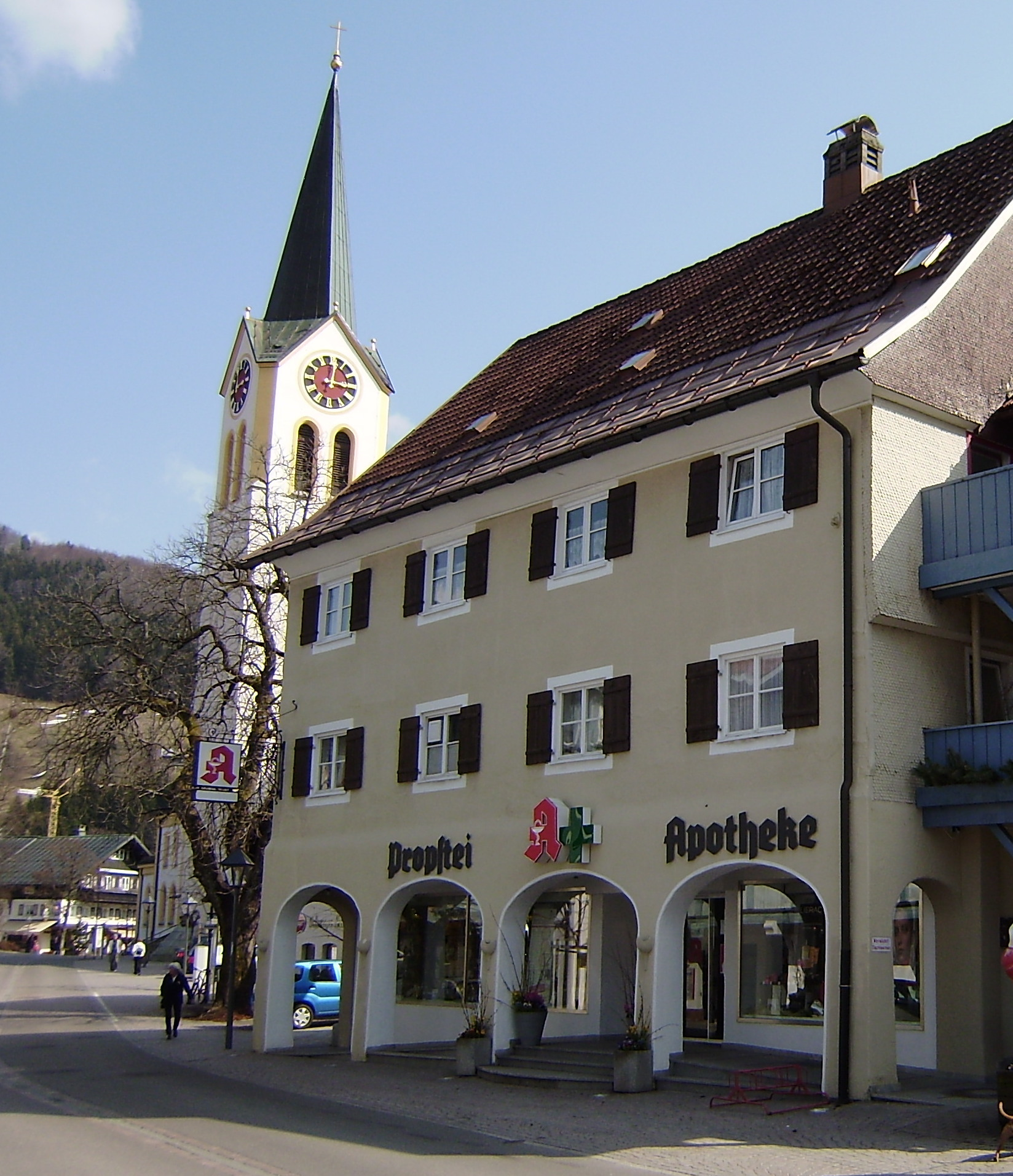 Propstei und Kirche Oberstaufen von NW